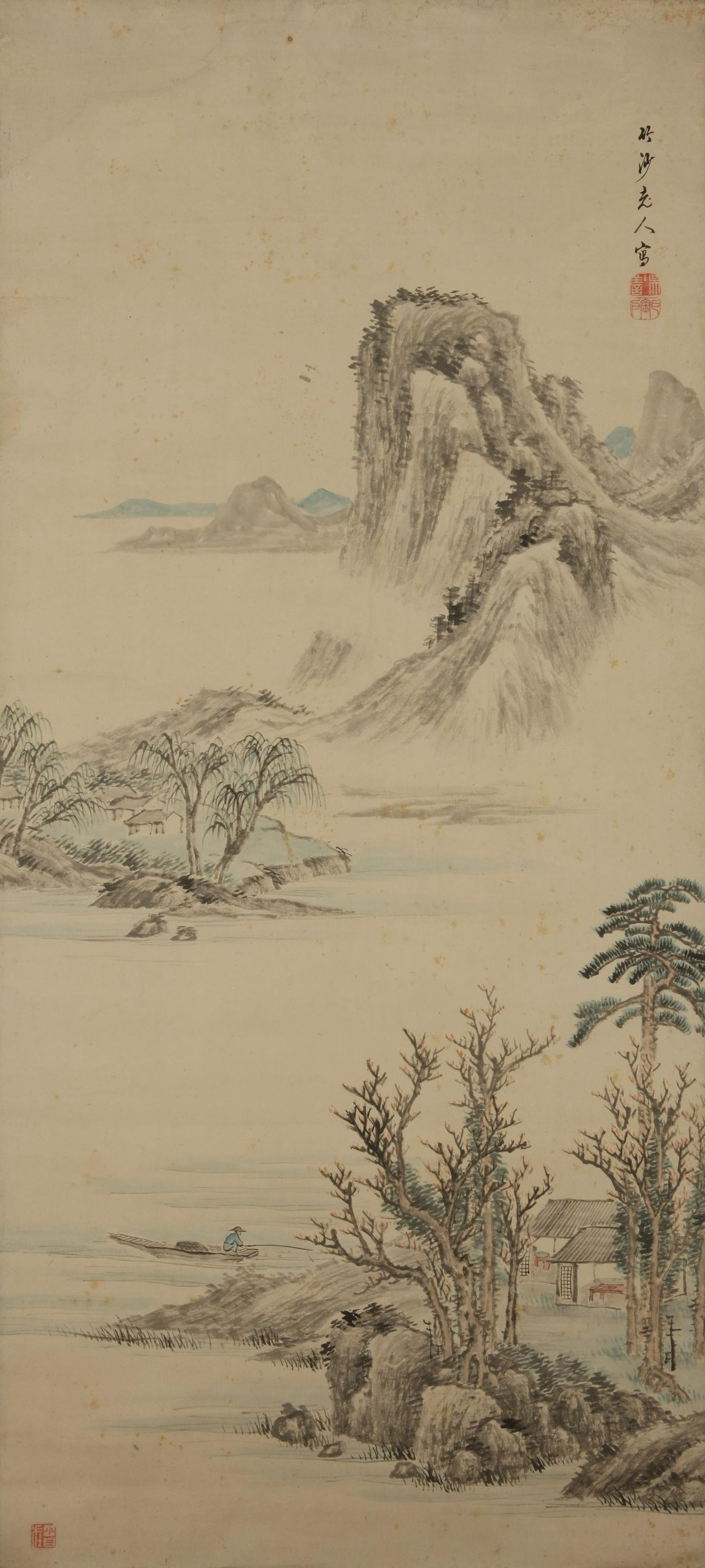 山水（図） 新潟県立図書館所蔵